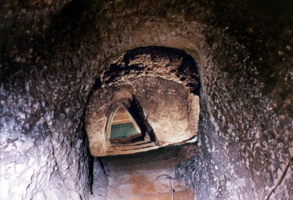 Ce puits d'origine très ancienne est sans doute à l'origine du développement du site.